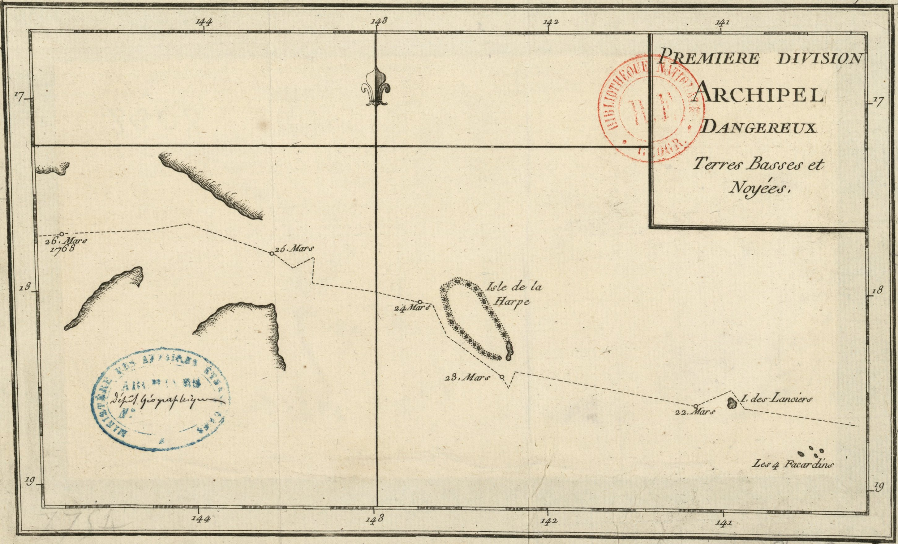 Carte des Tuamotu établie par Louis Antoine de Bougainville en 1768 (Première division, archipel dangereux, terres basses et noyées). Apparaissent Les Quatre Facardins (actuel Vahitahi), l'île des Lanciers (actuel Akiaki) et l'île de la Harpe (actuel Hao).